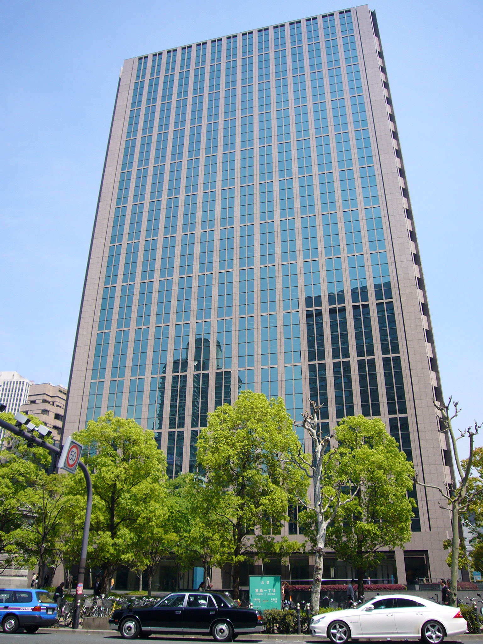 Dojima Avanza in Osaka, Japan